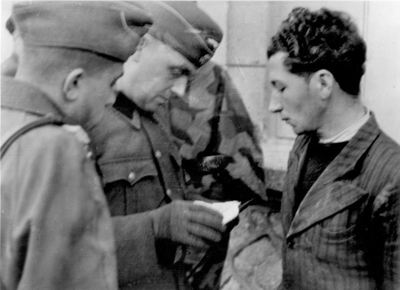 This description has been identified as biased or incorrect: Original Nazi-propaganda descriptionDer rote Marquis in Frankreich Ein guter Fang der deutschen Soldaten in Frankreich. Diese Kommunistenführer steht auf der Liste der Gesuchten. Sein Fluchtversuch konnte durch Streifkommandos vereitelt werden. Seine Papiere erweisen seine Zugehörigkeit zu Terrorgruppen. Foto: Kriegsberichter Koll